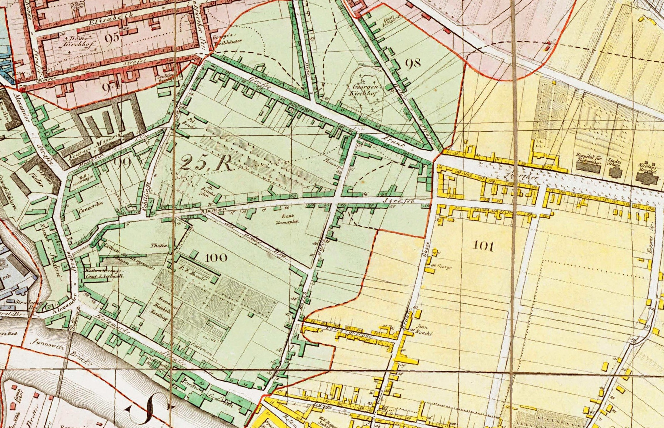 Grundriss von Berlin Aufgenommen und gezeichnet mit Genehmigung der Königl. Academie der Wissenschaften von J.C.Selter. Im Verlage bei Simon Schropp et Comp 1846. Format: 93,5 x 70,0 cm (nur der Plan) Maßstab: 1:5.800 Orientierung: Nord Kupferstich, koloriert Planquadrate: a-p und A-H Der Titel steht rechts oben in einer ovalen Umrandung. Der Rahmen enthält Längen- und Breitengrade (nach Ferro) - die Position des alten Observatoriums auf dem Marstall ist besonders hervorgehoben. In der inneren Rahmenleiste ist ein fortlaufender Maßstab eingebettet. Links unten ist ein Rechteck eingezogen mit einer Maßstabsleiste über 150 Ruthen. Die Teilstädte sind durch unterschiedliche Farben grafisch unterschieden. In den Grundstücken sind die Hausnummer tw. eingetragen. Mit einer rot/schwarze-gestrichelten Signatur sind die 26 Polizeireviere abgegrenzt und nummeriert.